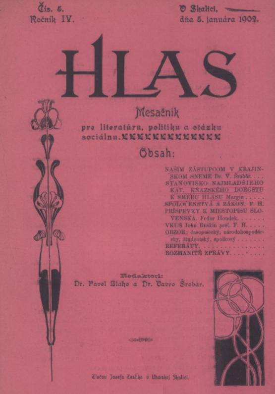 Titulná strana mesačníka Hlas : mesačník pre literatúru, politiku a otázku sociálnu, ktorý vychádzal v rokoch 1898 - 1904. Šéfredaktorom bol P. Blaho a V. Šrobár.